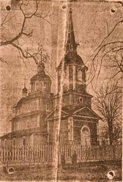 Беларуская (тарашкевіца): Слуцак (Słucak), Востраў (Vostraŭ). Царква Сьвятога Міхала Арханёла.